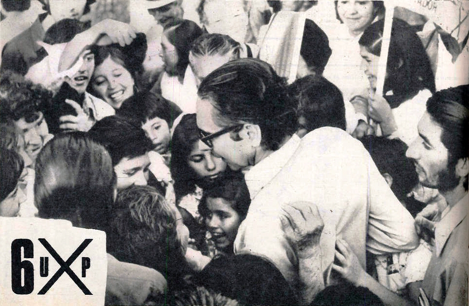 Inserto de campaña en revista Vea, de las elecciones parlamentarias de 1973, del candidato de la Unidad Popular, Carlos Altamirano. En la fotografía aparece Salvador Allende, y en la parte inferior, Altamirano saludando a sus adherentes. "Aseguremos la más alta mayoría. Altamirano es decisión revolucionaria."